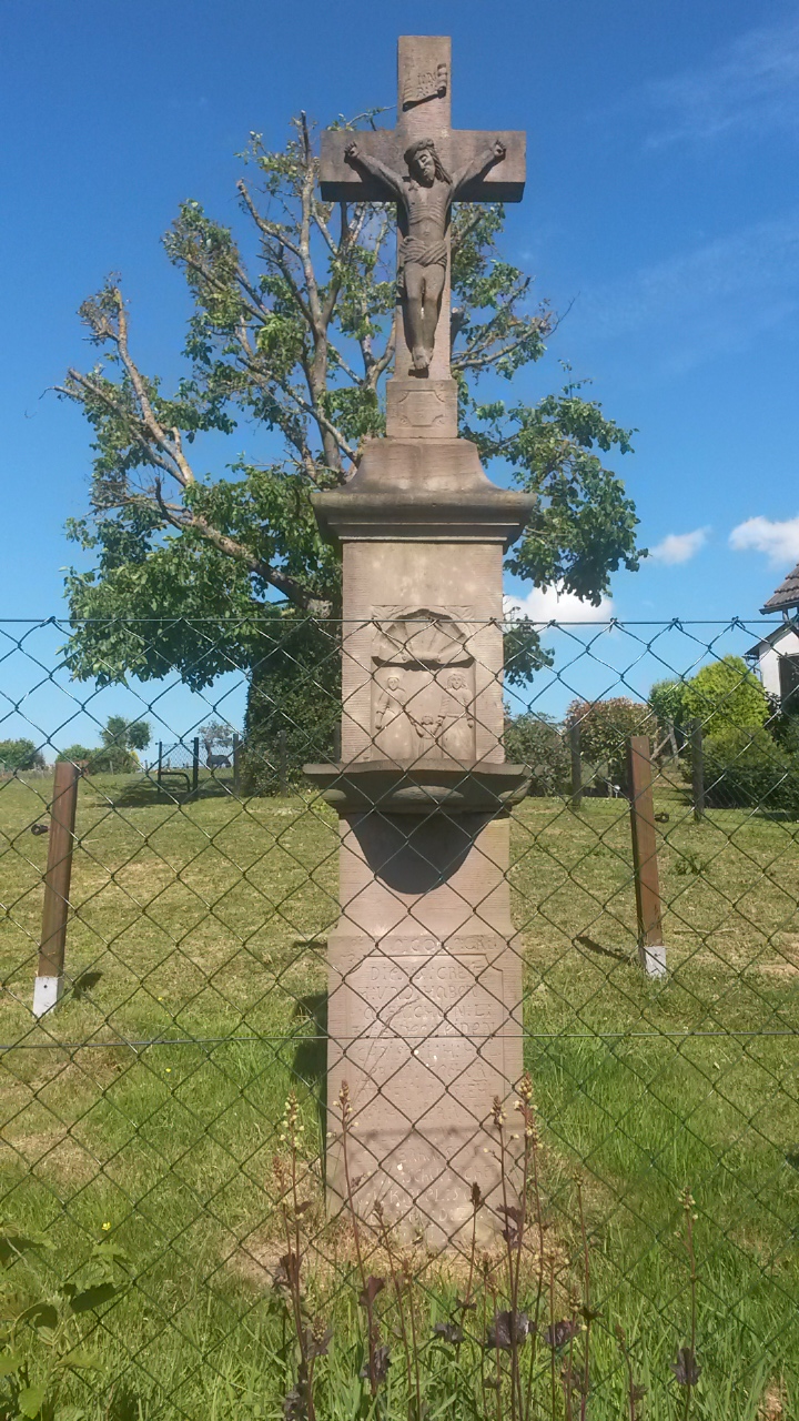 Das ca 2,60 hohe Wegekreuz aus Sandstein wurde im Jahre 1796 errichtet. Im mittleren Teil des Sockels befindet sich ein Karniessims vor einer Muschelgrotte. Oberhalb schliesst ein Kreuz den Sockel ab.This is a photograph of an architectural monument., no. 69